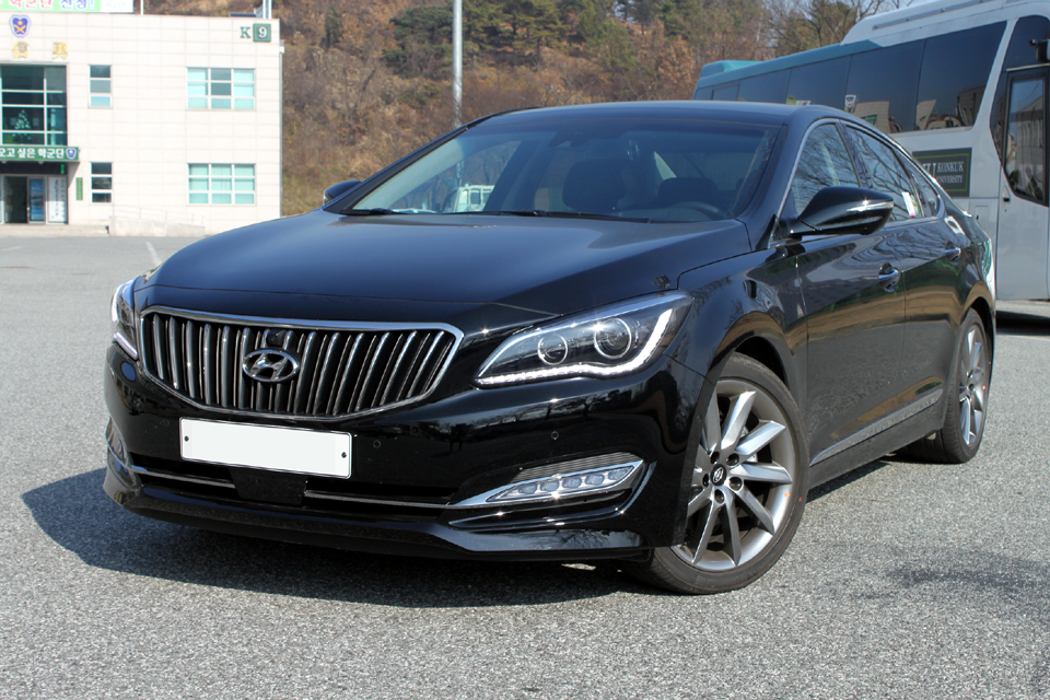 Hyundai Aslan